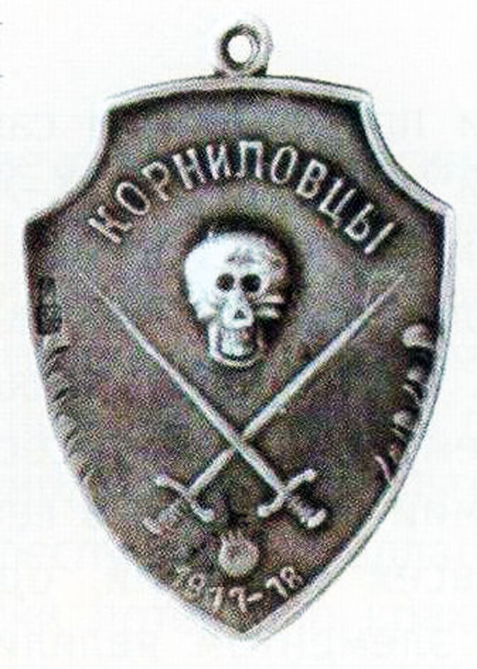 Знак отличия Корниловского полка (мёртвая голова).